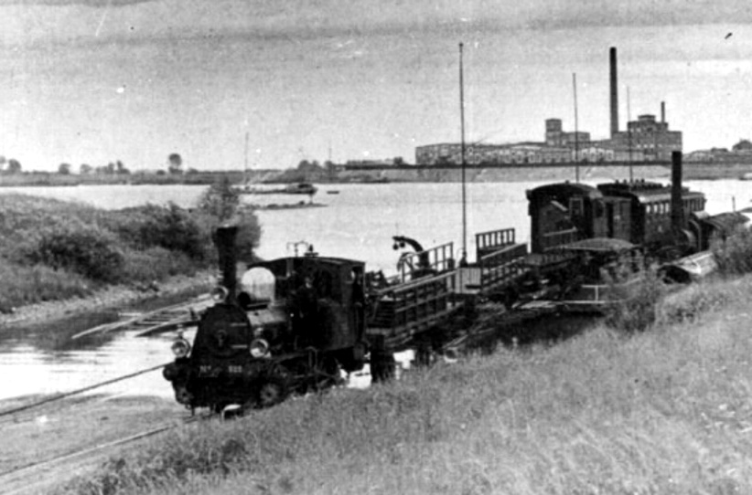 Catalogusnr. 160458 Datering 01/01/1913 - 31/12/1913 Beschrijving Gezicht op de spoorpont over de Rijn te Welle (Duitsland, spoorlijn Elten - Kleve), met een stoomlocomotief uit de serie 500 van de S.S. (later serie 6800 van de N.S.) Vervaardiger Nederlandse Spoorwegen (fotograaf) Opmerkingen Afbeelding behoort tot de Collectie De Pater. Repro van een foto in het gedenkboek "Maatschappij tot Exploitatie van Staatsspoorwegen 1863-1913" (bibl. HUA NS DF 14) Soort beeldmateriaal Fotografische documenten Categorie Maatschappelijk leven Topografie Negatief NS 206 Reproductienegatief